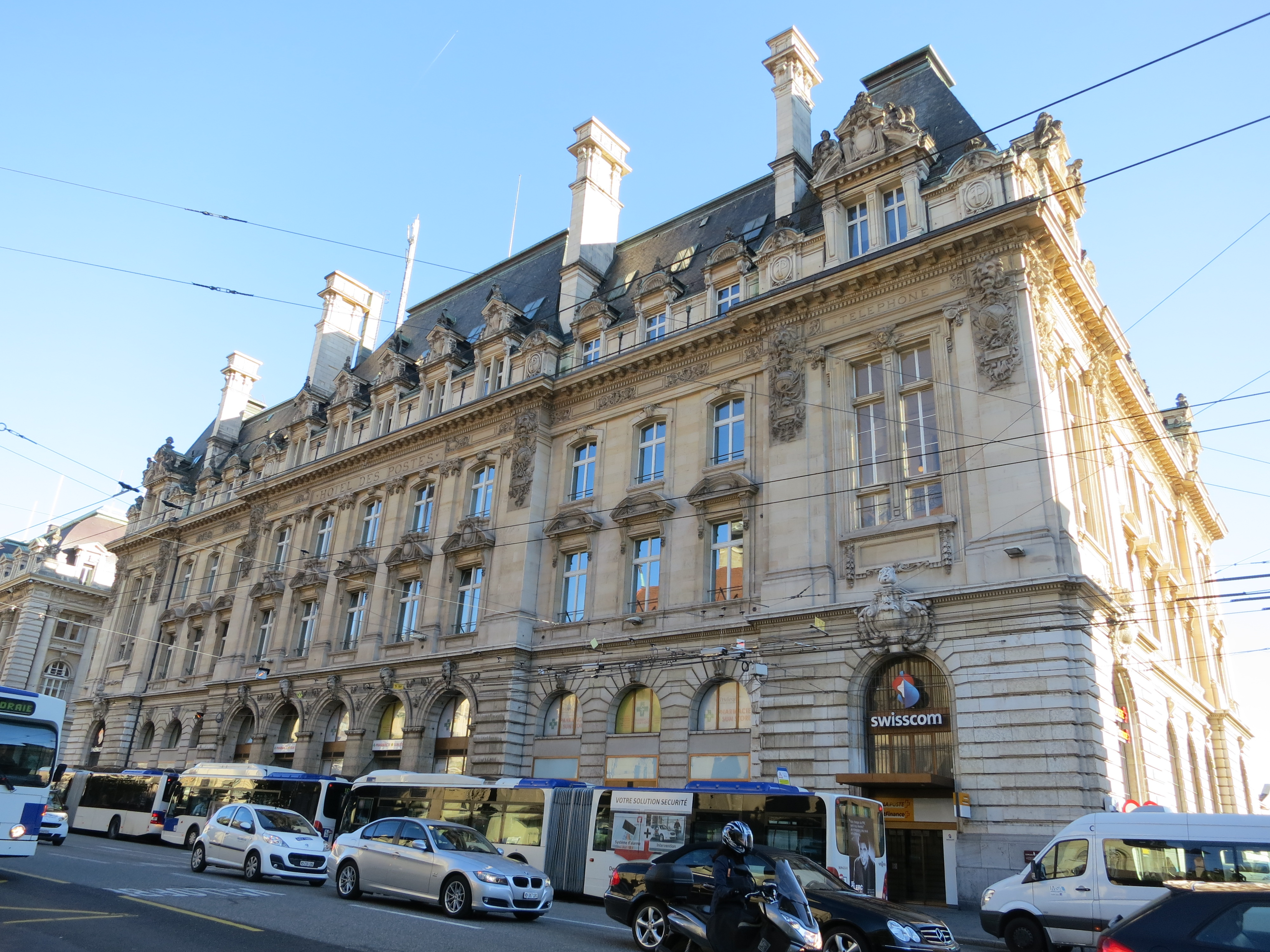 Hôtel des Postes